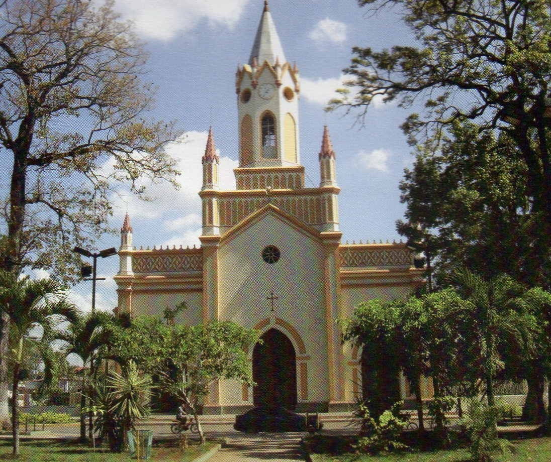 Iglesia de tin.